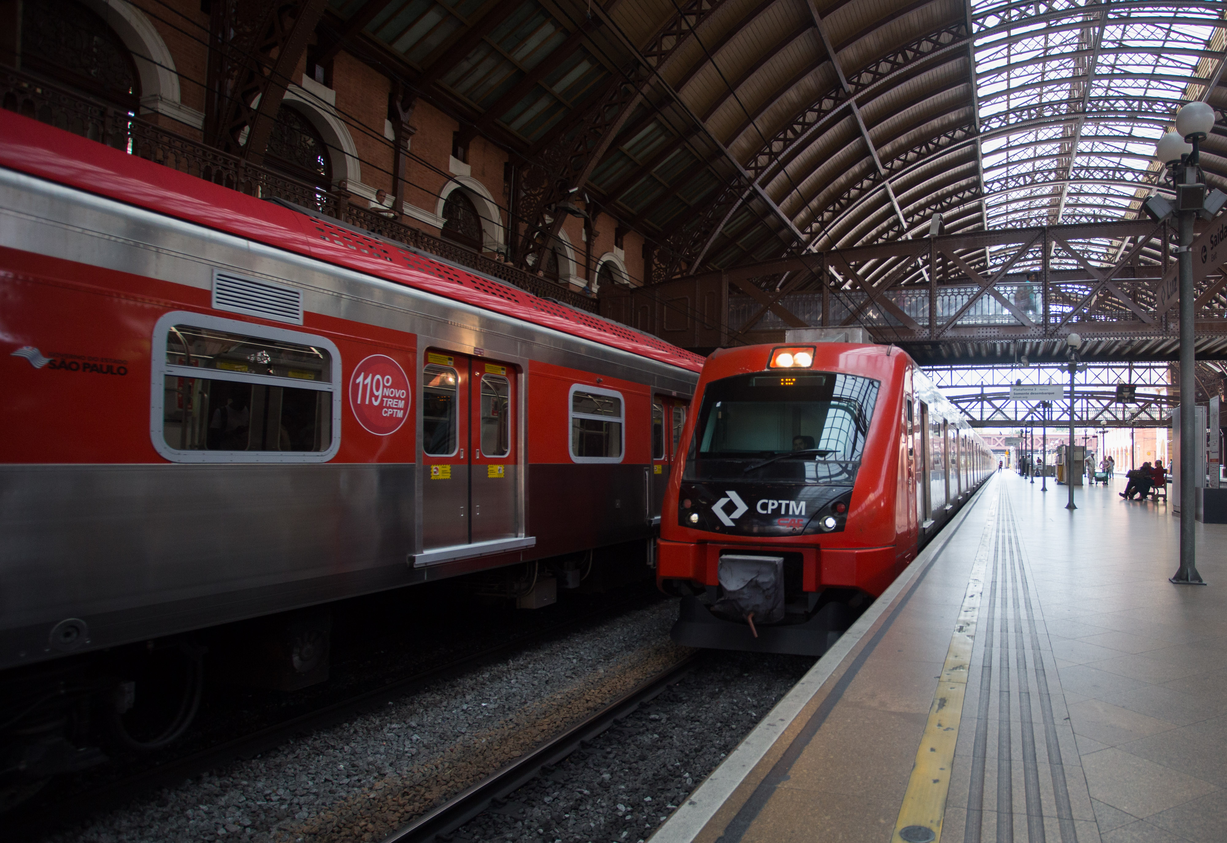 O Governador Geraldo Alckmin, participa da entrega de trem da Hyndai para a linha 7 e CAF para a linha 11 do Metro.DATA 26/09/2017. LOCAL: São Paulo/SP. FOTO: Diogo Moreira